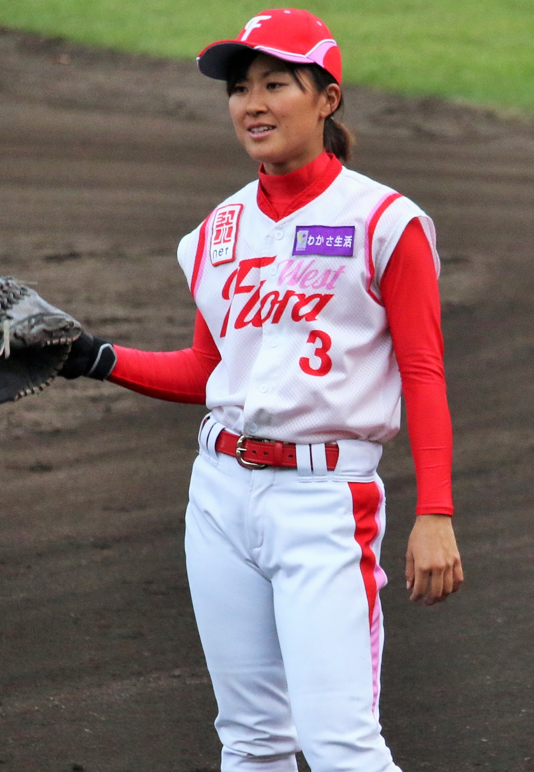 ウエスト・フローラ外野手の三浦伊織。わかさスタジアム京都にて。